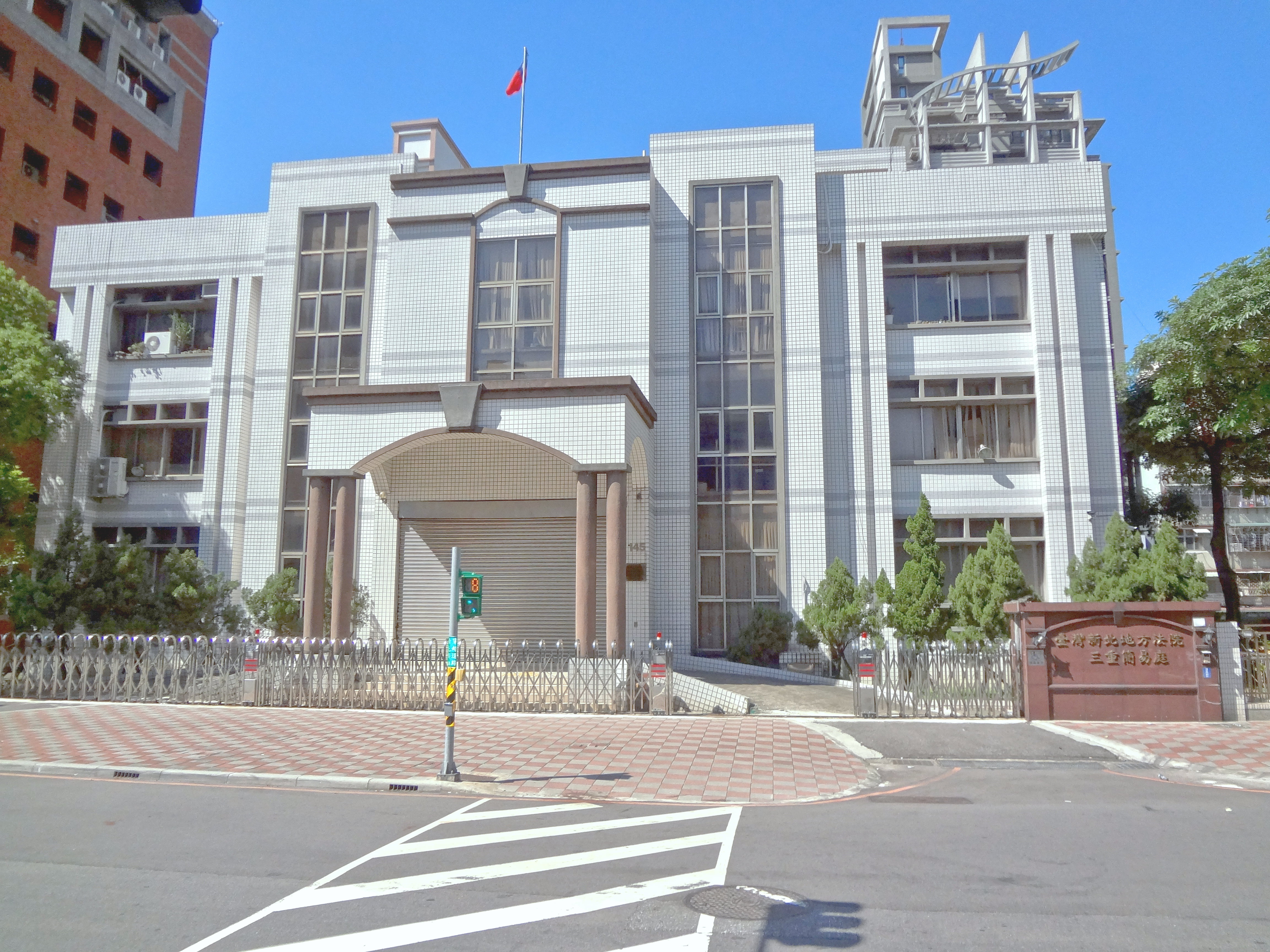 臺灣新北地方法院三重簡易庭，地址：新北市三重區重新路三段145號。